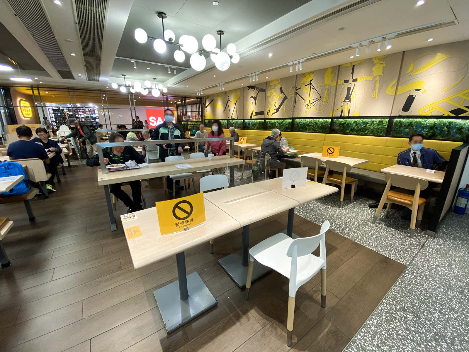 Cafe de coral arrangement during COVID-19